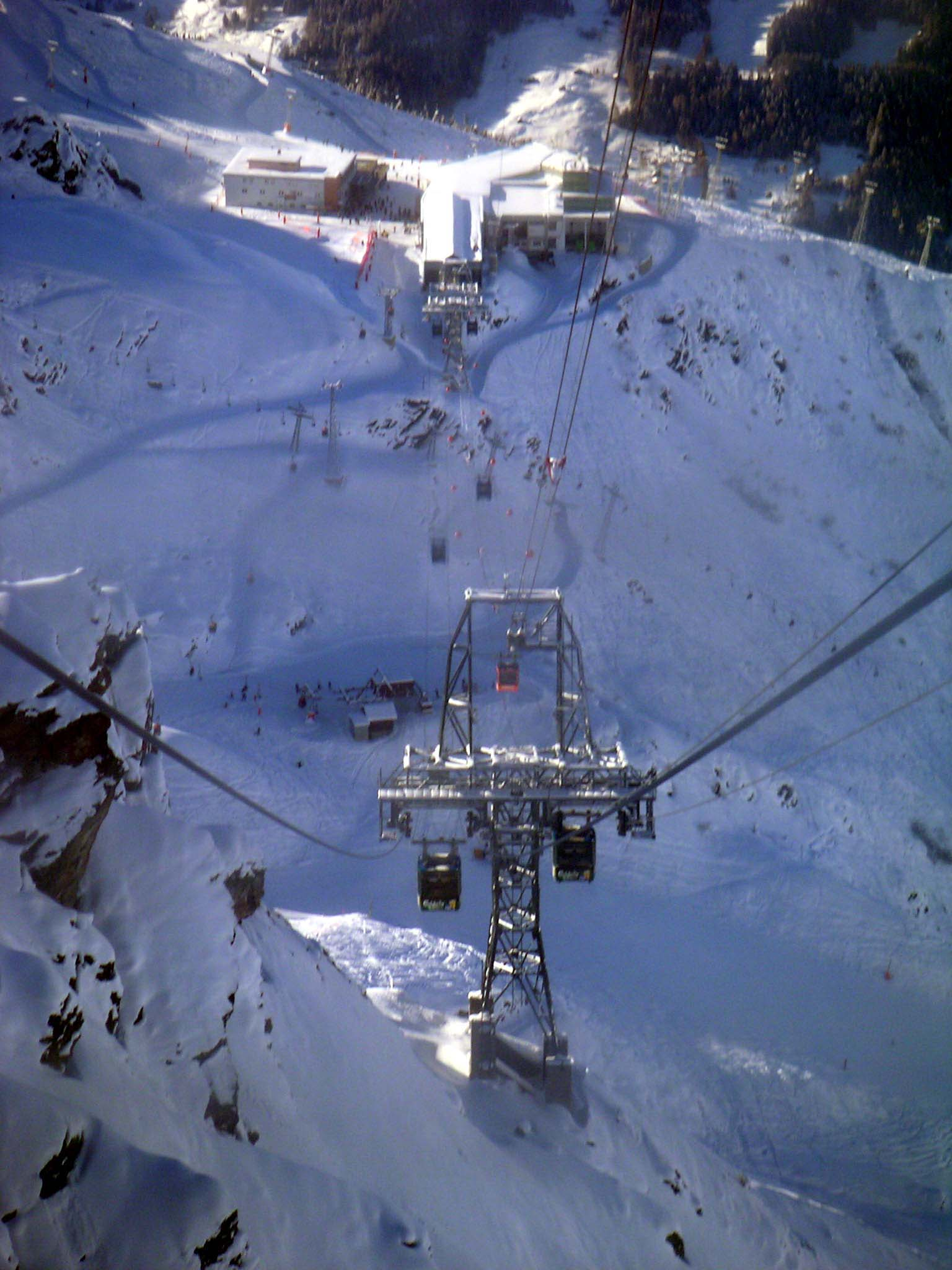 Funi Space im Skigebiet 4 vallées